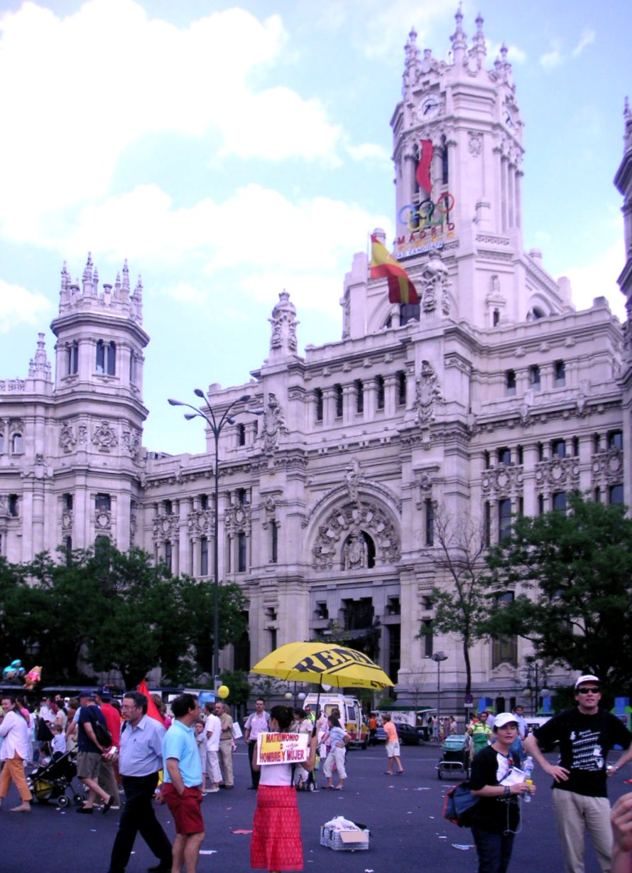 Palacio de Correos (Communications Palace) in Madrid's Cibeles Square